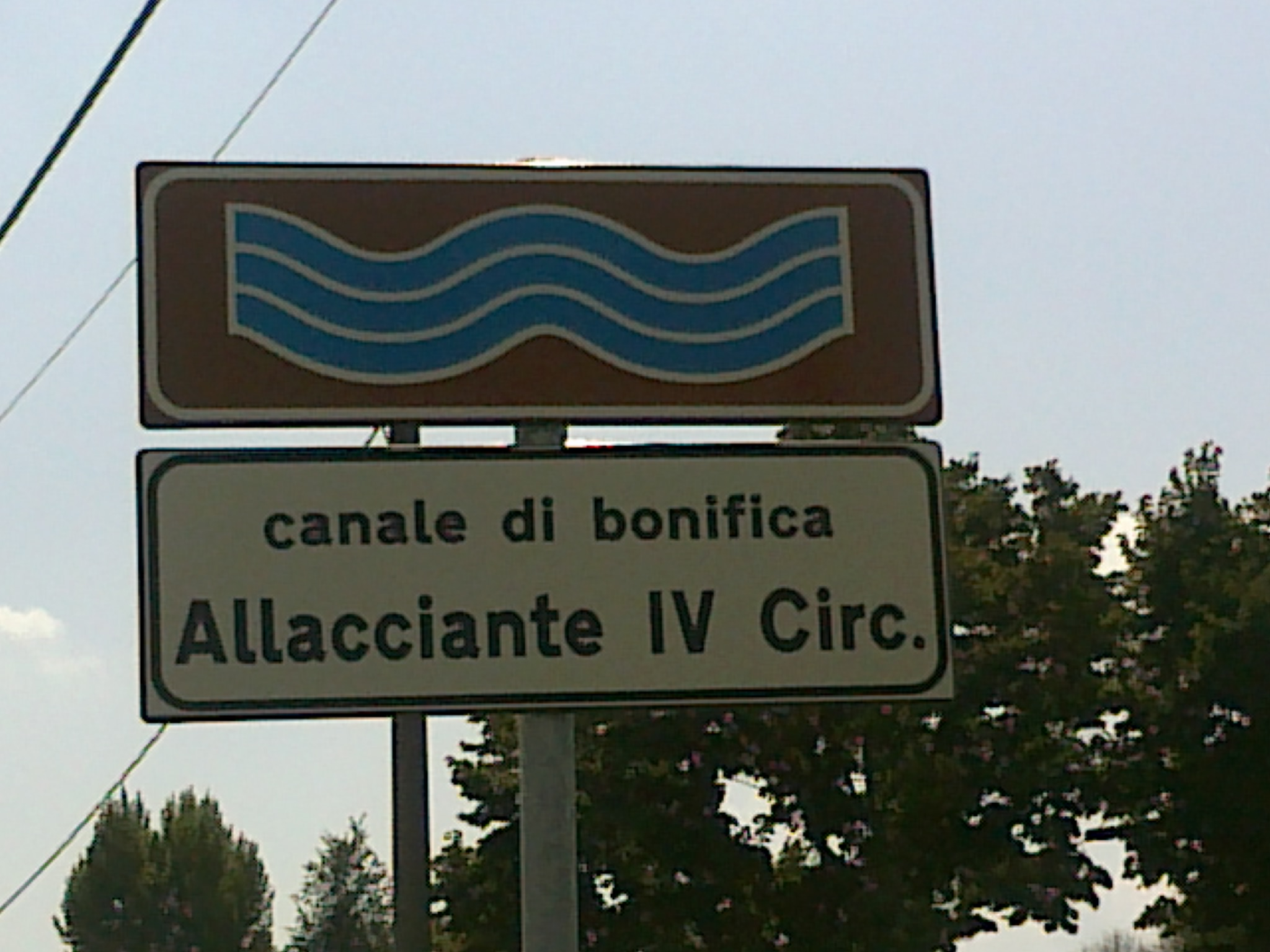 Cartello presso Minerbio